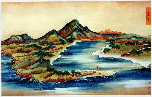 Селение Райтиси (Усть-Айнское). Рисунок Мегата Татеваки, 1857 г. Библиотека Университета Хоккайдо